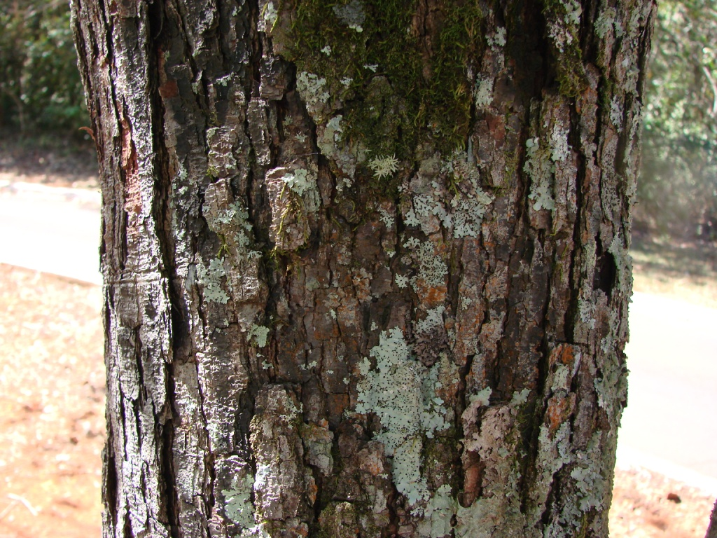 Copaifera langsdorffii - FABACEAE Jardim Botânico de Brasília - DF - Brasil